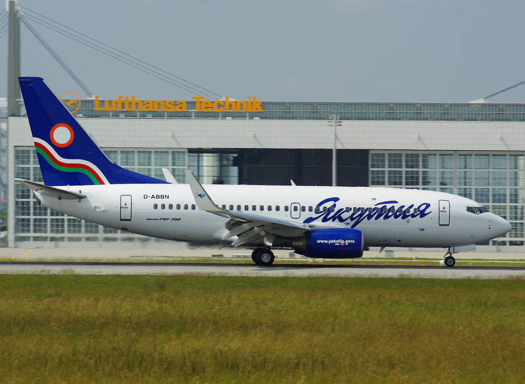 ex Air Berlin future VQ-BEO